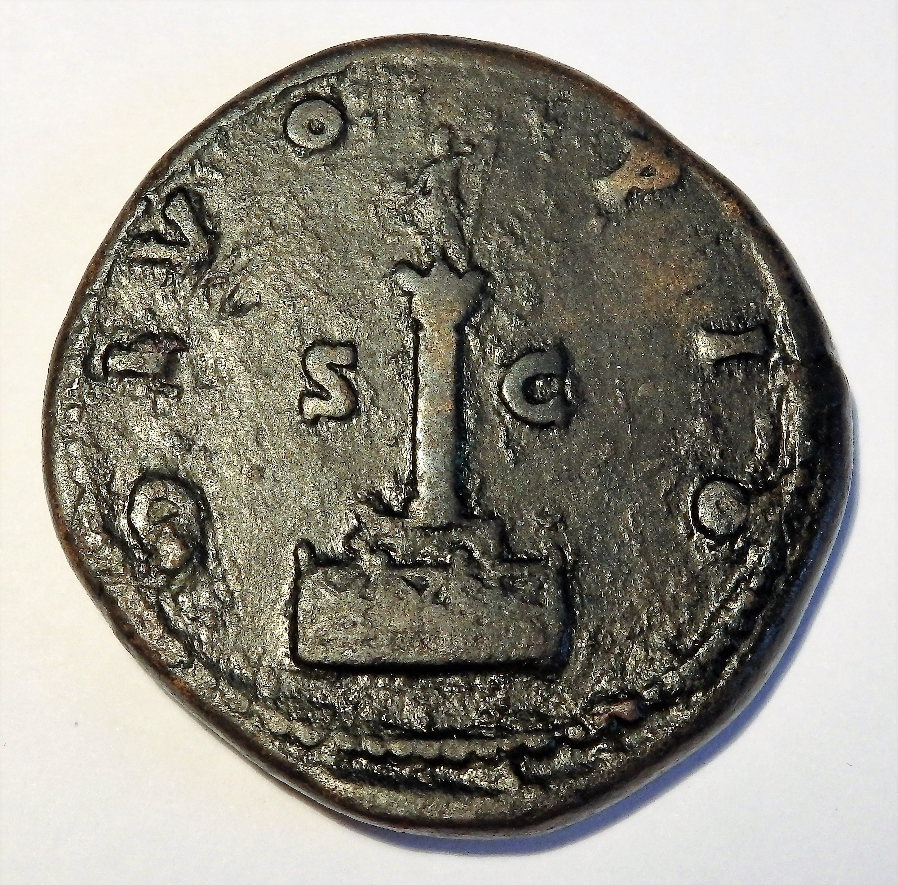 Antoninus Pius Säule auf Sesterz, Umschrift DIVO PIO, Kampmann 35.319